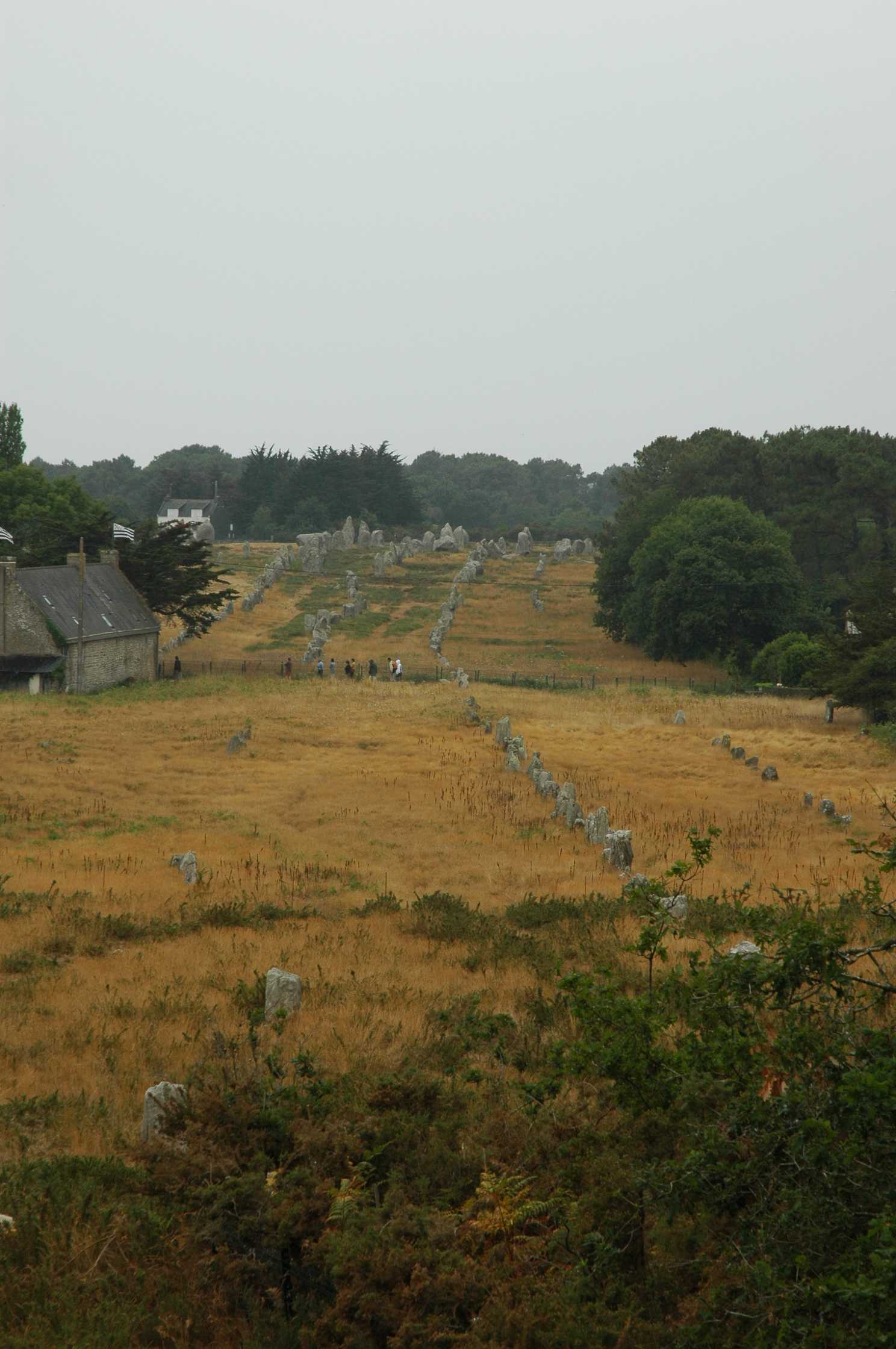 megalietenlijnen in Carnac, frankrijk, Fotot door Geert Stevens